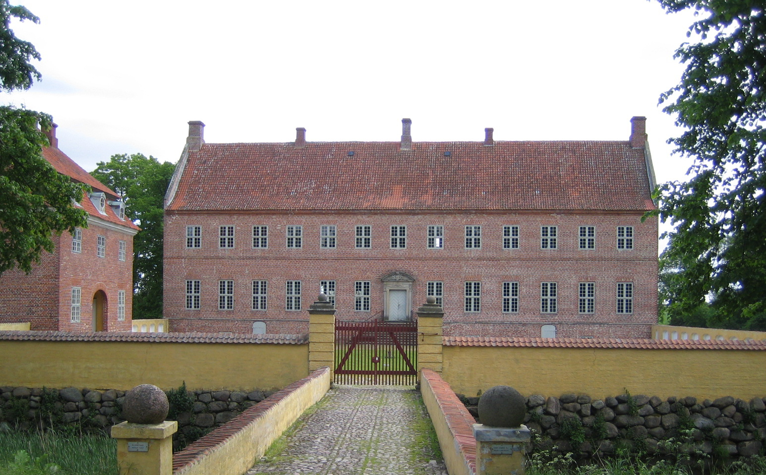 Selsø slot